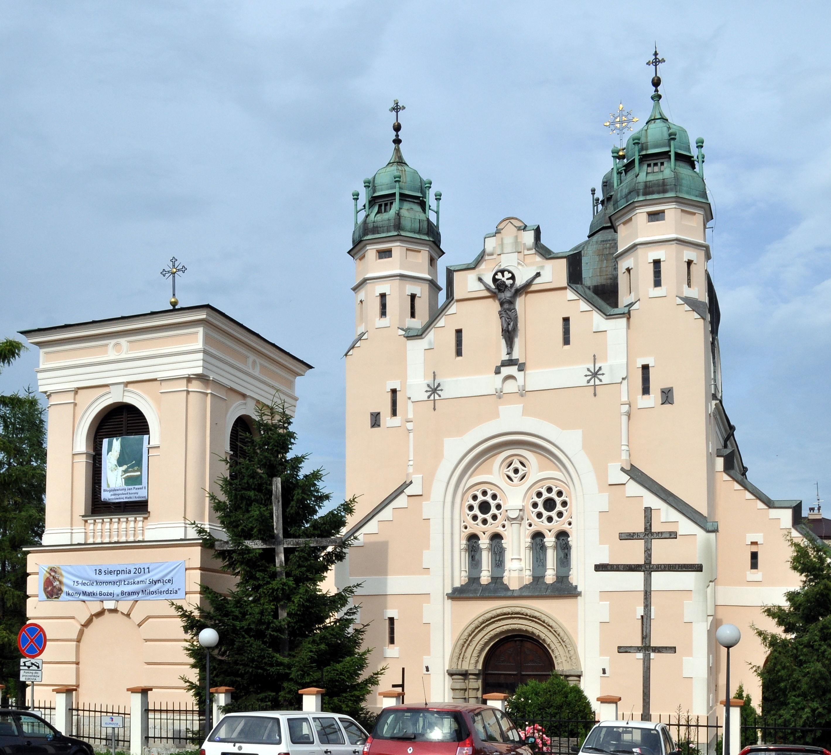 Jarosław, ul. Sobieskiego - dawna cerkiew greckokatolicka p.w. Przemienienia Pańskiego, obecnie kościół rzymskokatolicki (zabytek nr A/297 z 22.02.1951).